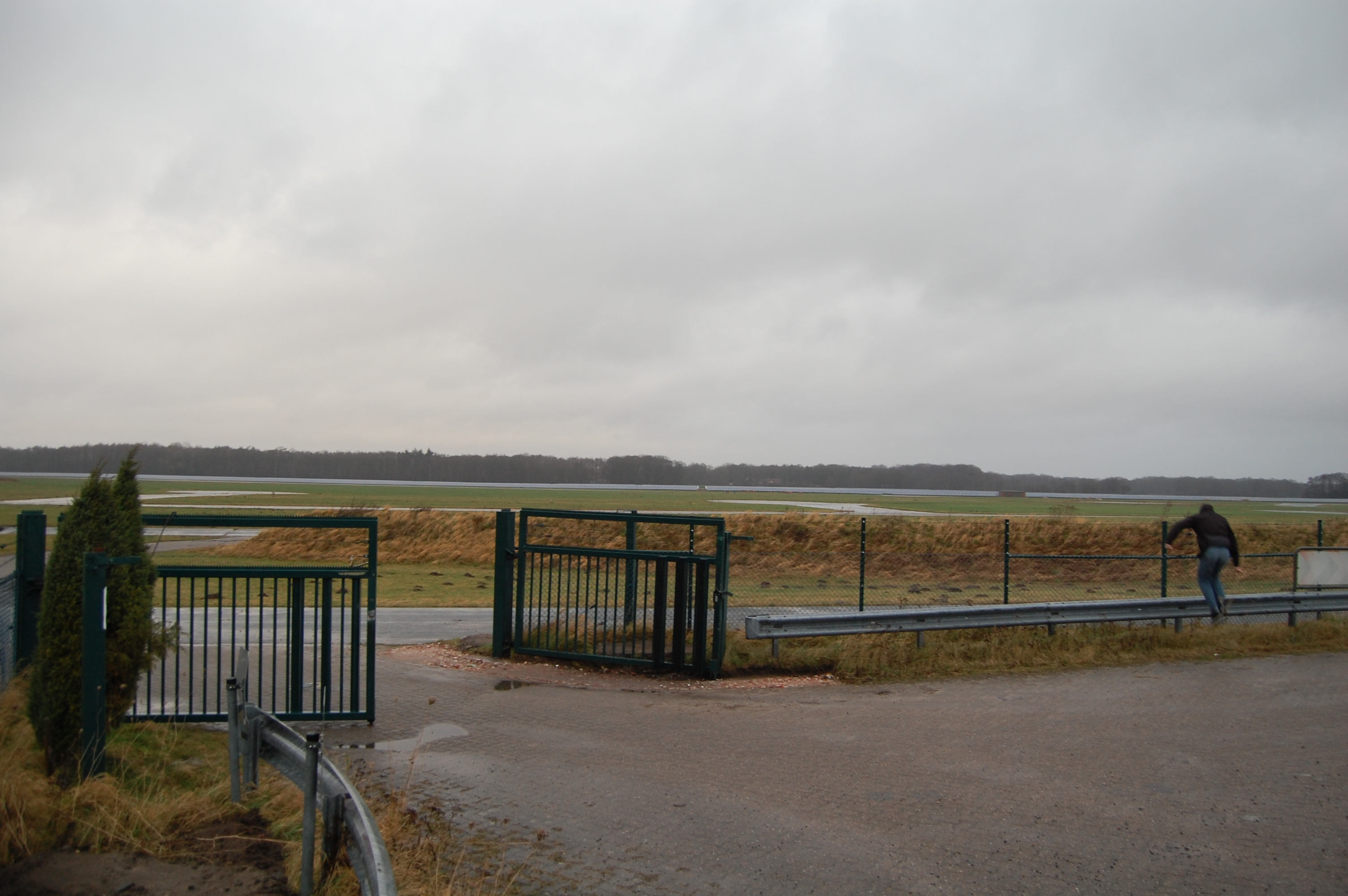 Solarpanels auf dem Flugpark Ahlhorn - fotografiert von Süd-Ost Seite des Geländes.